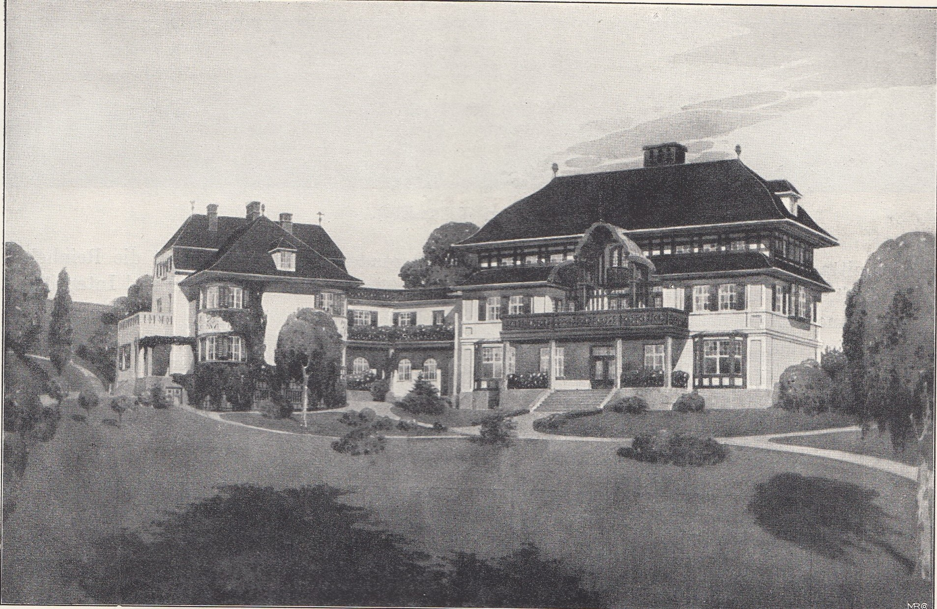 Kindersanatorium Zell bei Ebenhausen im Isartal (aufgenommen ca. 1925)